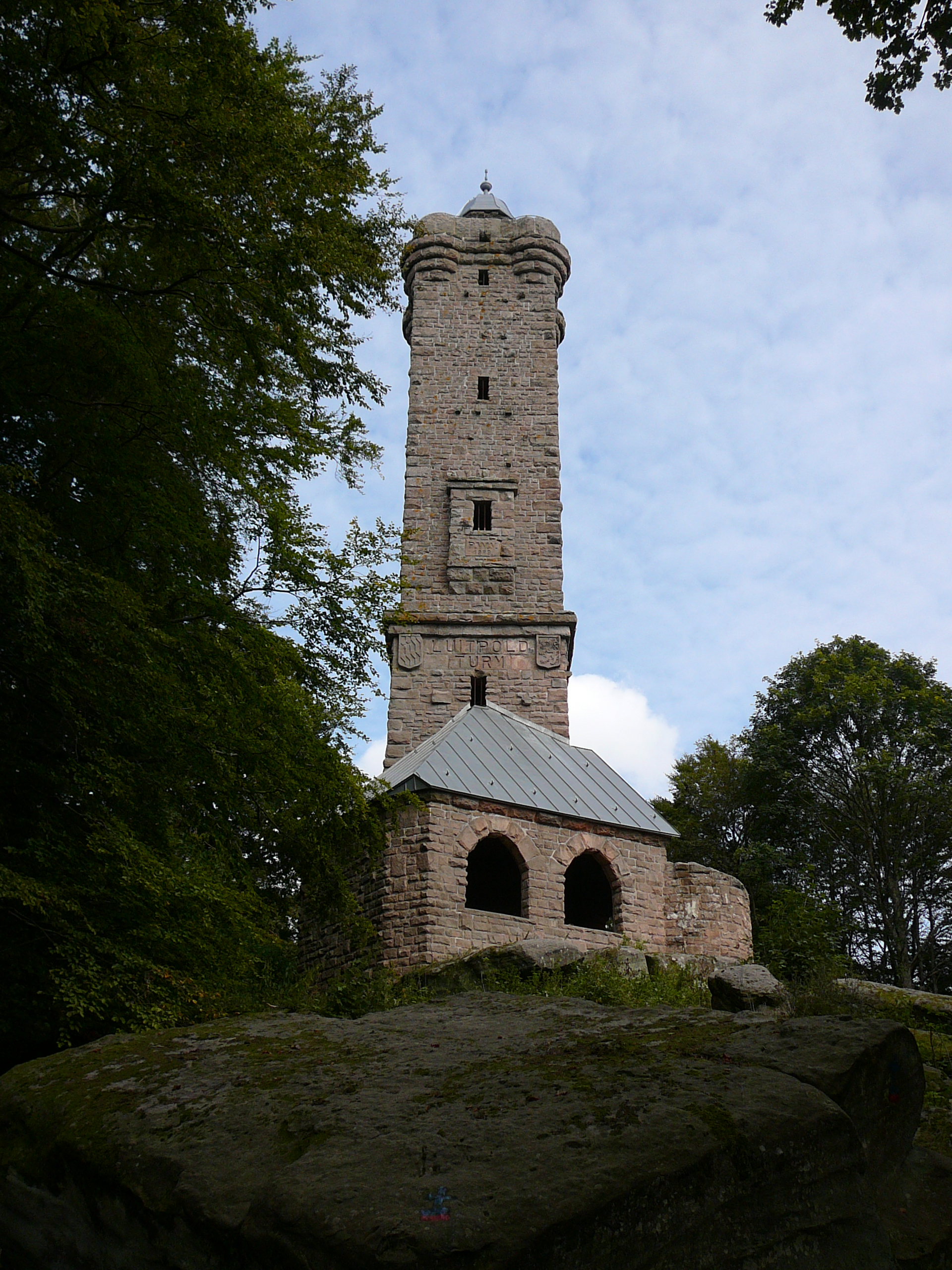 Luitpoldturm auf dem Weißenberg